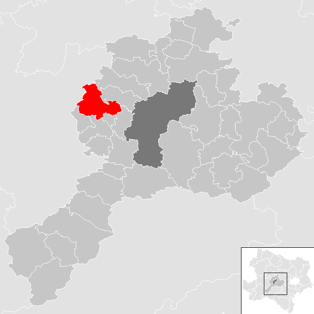 Bezirk St. Pölten-Land